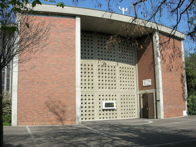 Römisch-katholische Pfarrkirche St. Laurentius Winterthur-Wülflingen, Ansicht des Kirchenportals von Südost